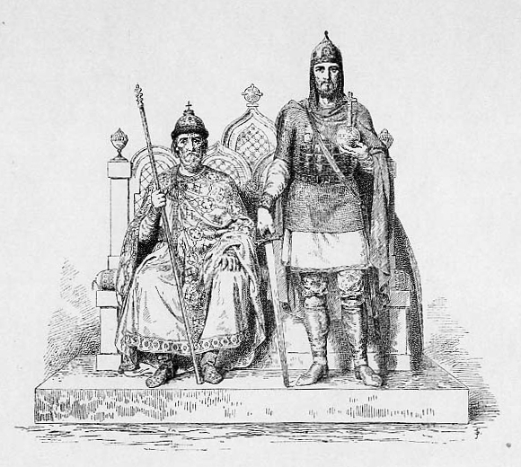 Великий Князь Изяслав Мстиславич и дядя его Вячеслав Владимирович. 1146-1155 г.Изяслав II добровольно разделил престол Киевский с дядею своим, Вячеславом Владимировичем, снискав себе почтительностью к старшему похвалу и расположение народа. По смерти Изяслава, престарелый дядя признал сыном своим и государем Россиян Ростислава, но последний утратил престол тотчас по кончине дяди.